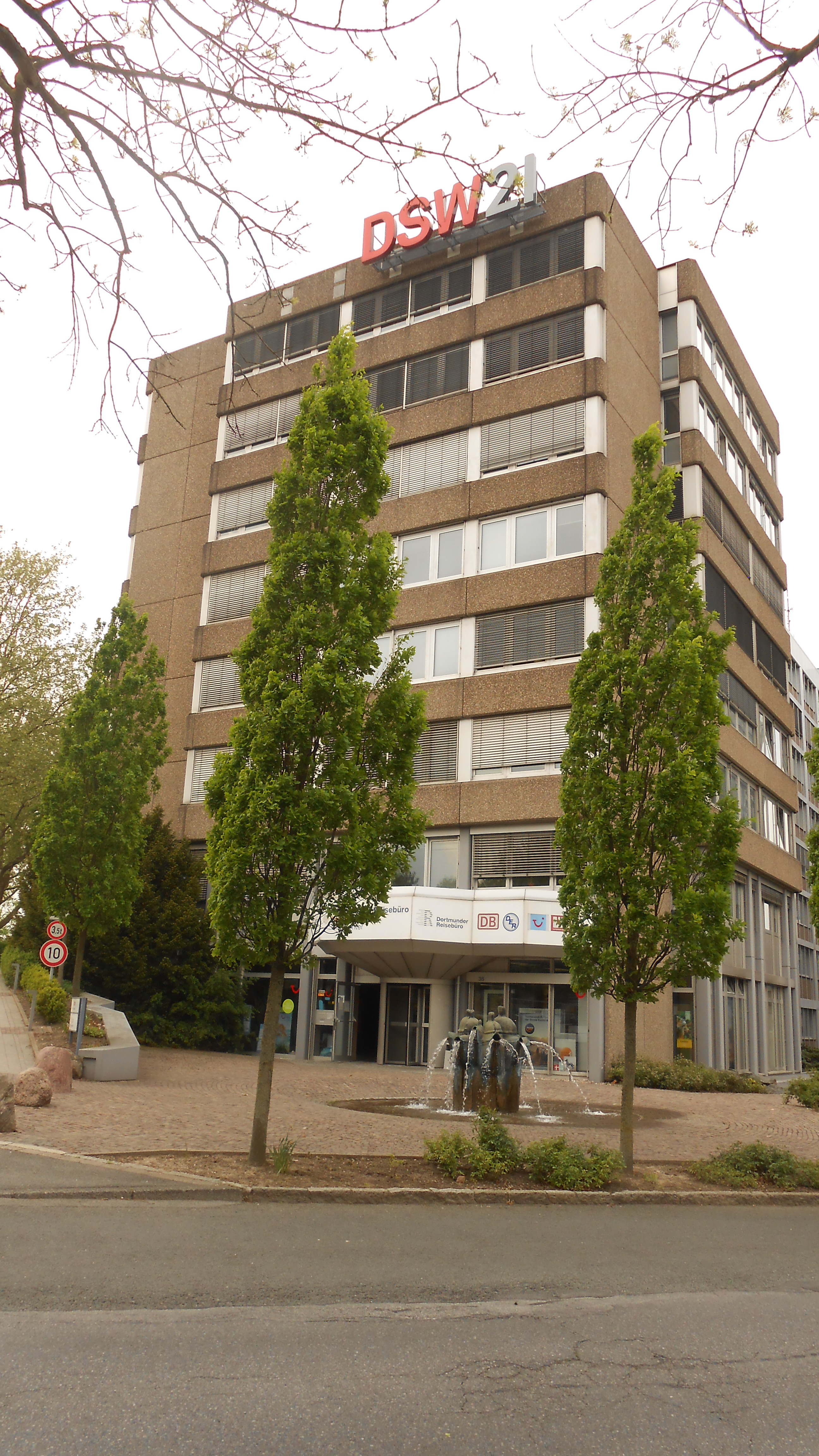 Verwaltungsgebäude der DSW21 in der Deggingstraße.